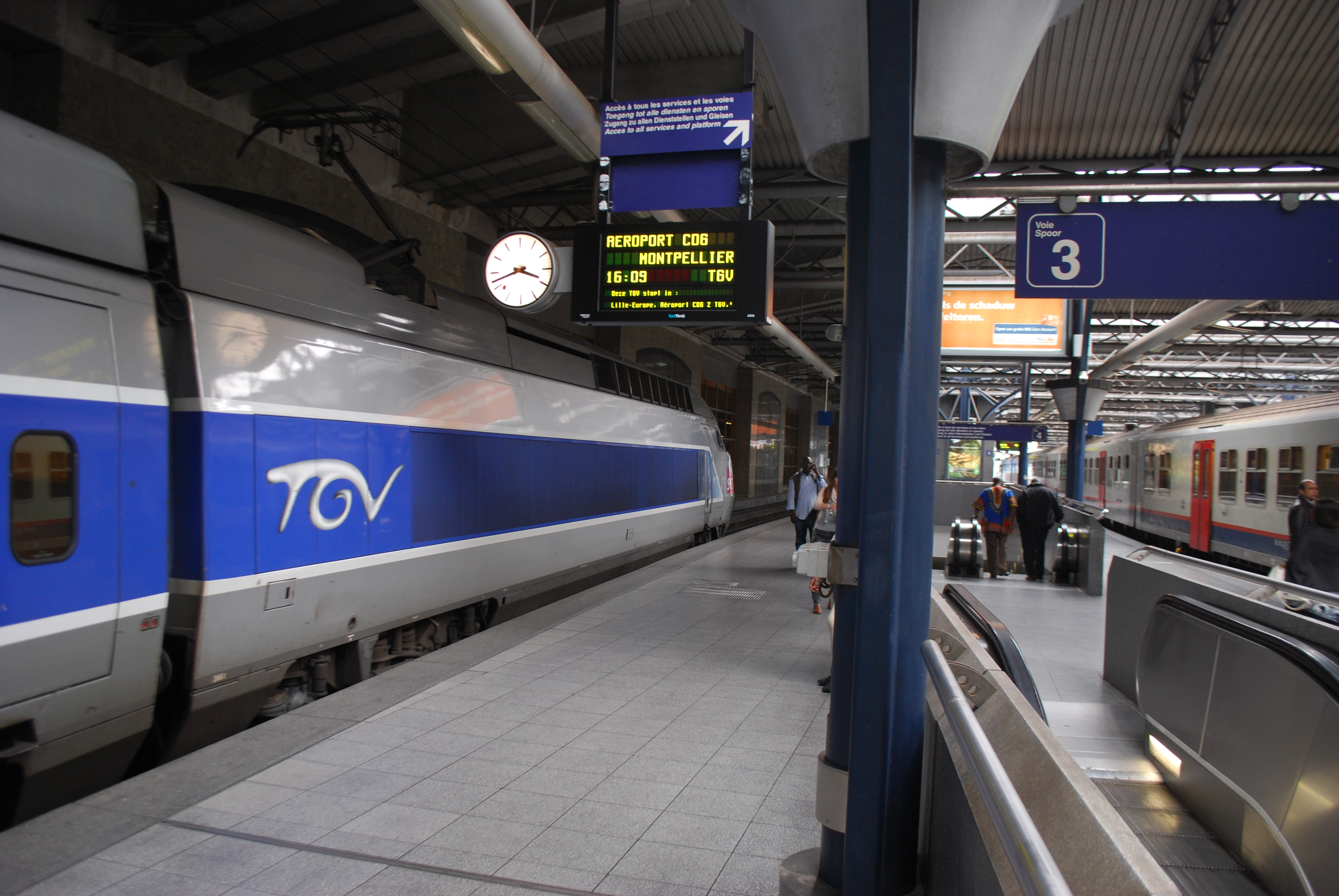 Voiture de queue du TGV vers l'aéroport de Roissy Charles-de-Gaulle et Montpellier, au départ de la gare de Bruxelles-Midi.